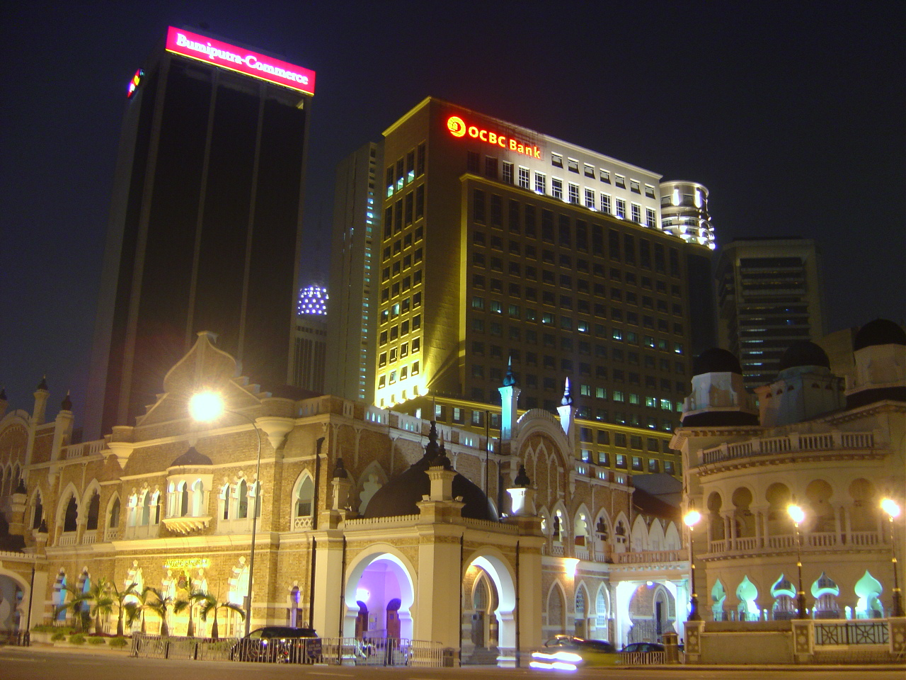 OCBC_Bank in Kuala Lumpur, MalaysiaOCBC bank